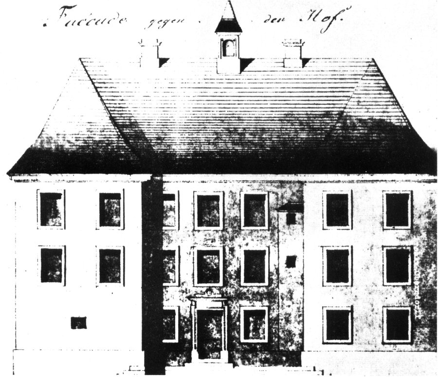 "Burg" Gronau bei Alsheim